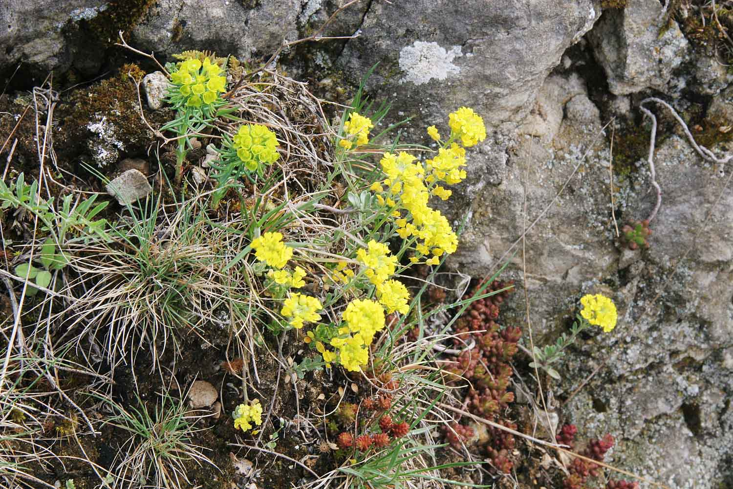 Alyssum montanum from Český kras, Czech republic autor:Prazak